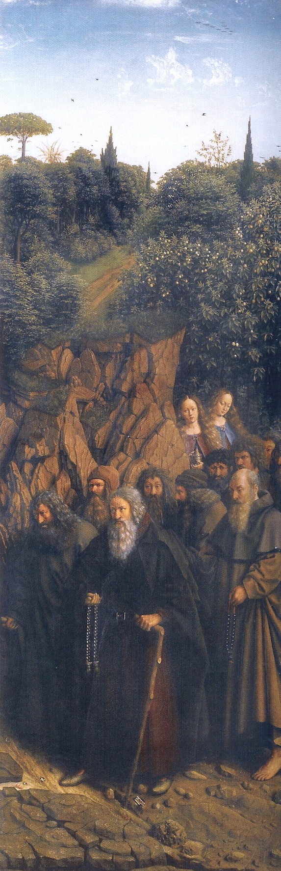 detail: hermits